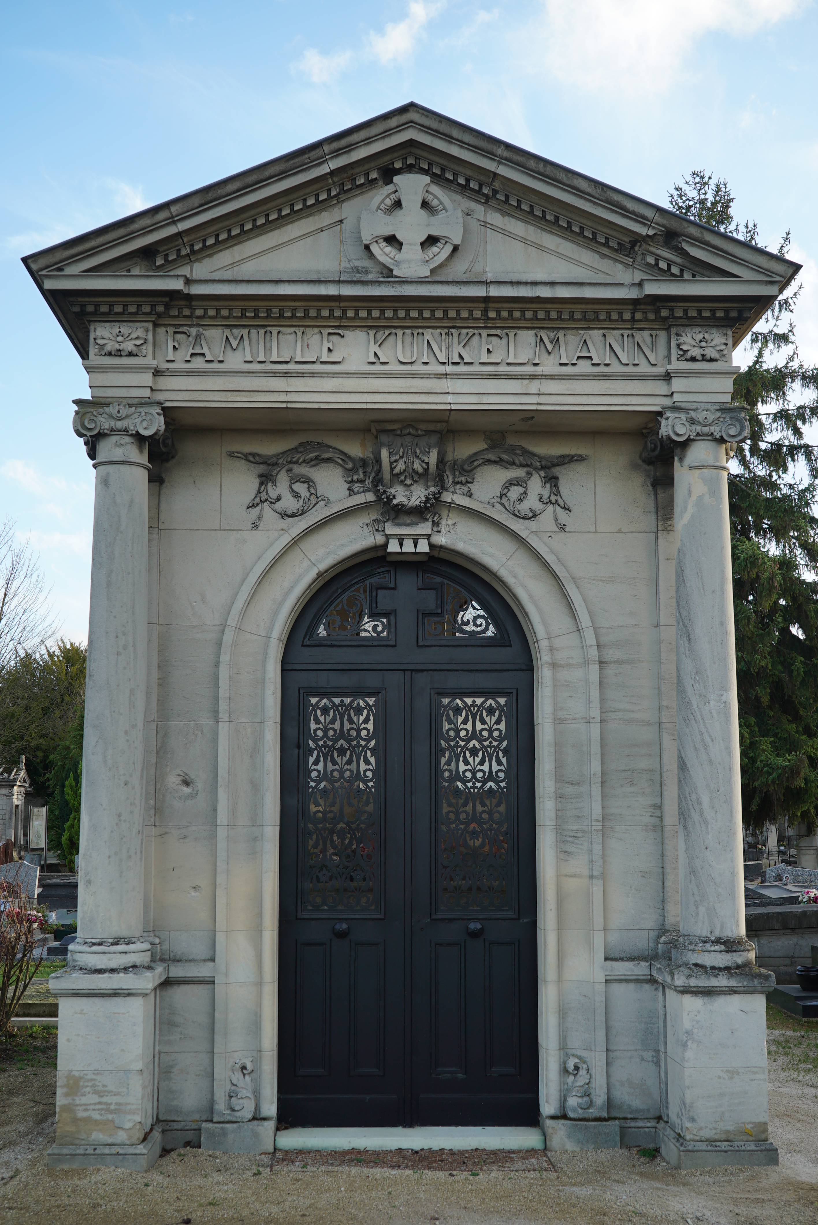 concession Kunkelmann-Dietz, canton 16.